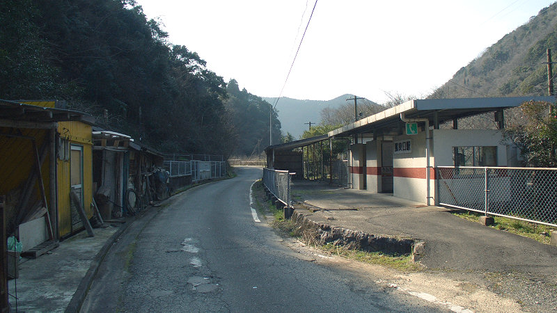 JR肥薩線那良口駅 駅舎と周辺 写真奥が西。道路は熊本県道・鹿児島県道15号人吉水俣線。 撮影者/著者/著作権保有者 : MK Products (本人がアップロード) 撮影日 : 2007/02/24 那良口駅用にアップロードした画像です。良い画像があれば別の画像に変えてください。